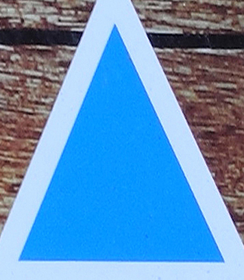 Auf dem Jeschken-Kammweg: Kegelwegzeichen (blaues Dreieck auf weißem Grund)